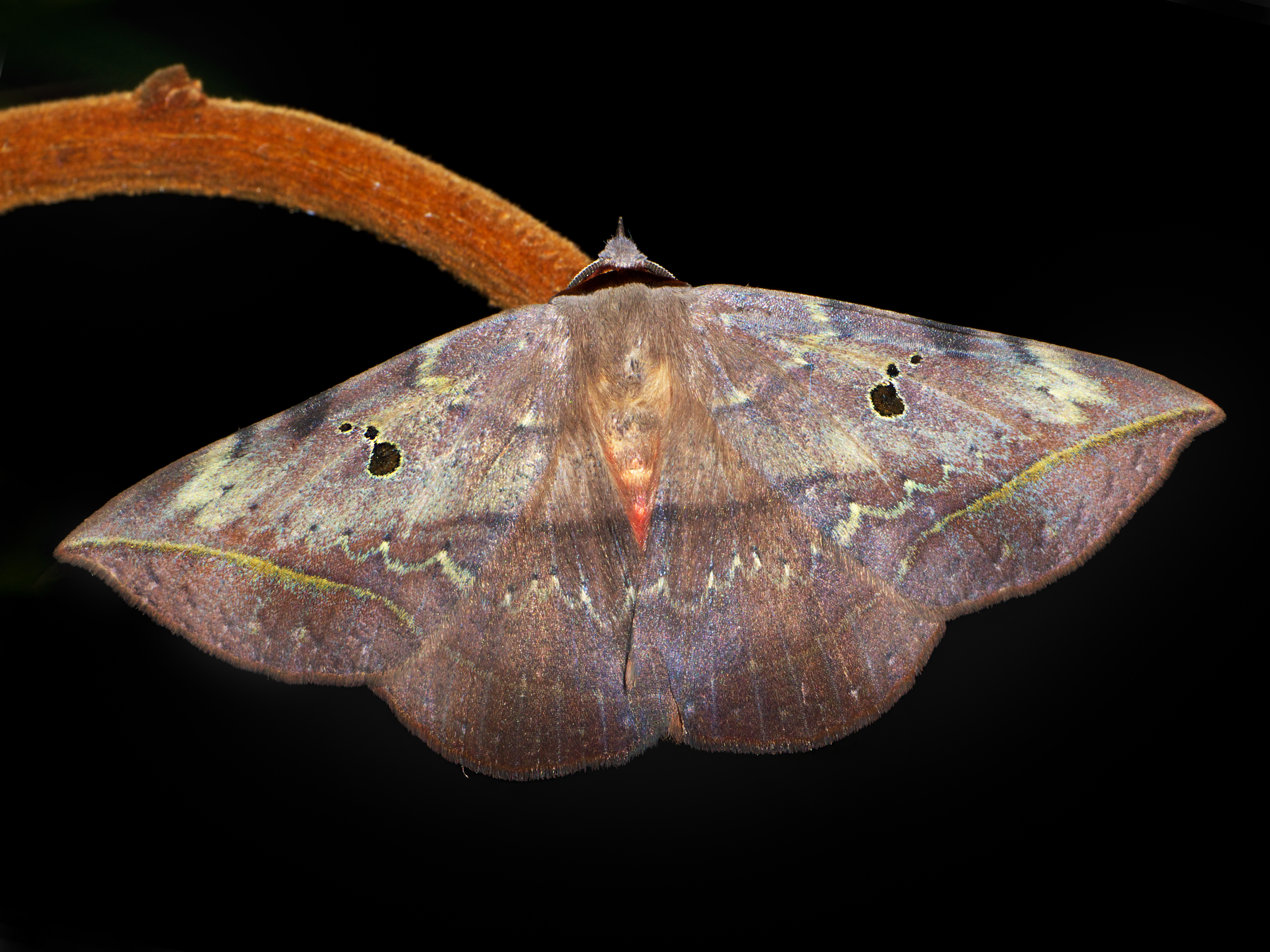 Panasonic GX7 + Leica DG Macro-Elmarit 45mm F2.8 ASPH OIS